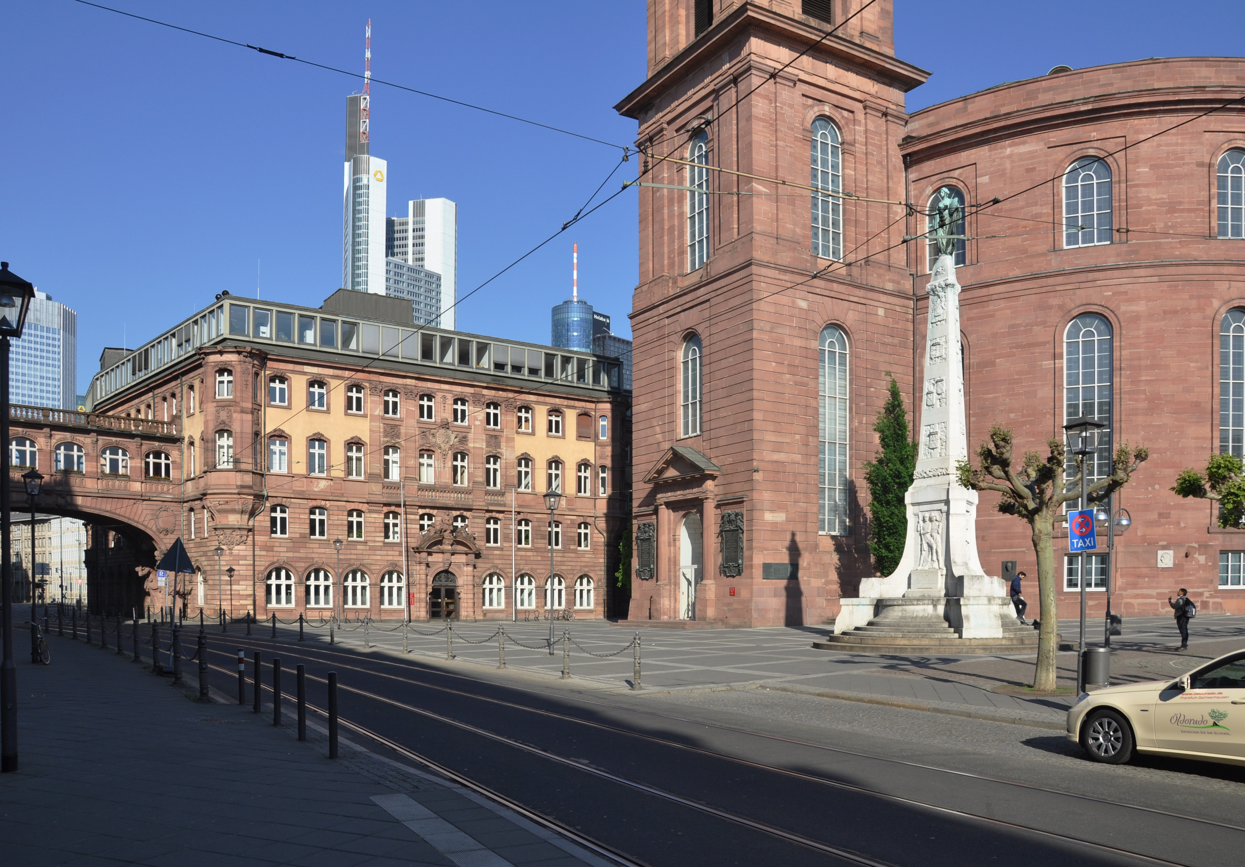 Frankfurt am Main, Einheitsdenkmal am Paulsplatz mit Paulskirche und Neuem Rathaus (Nordteil)